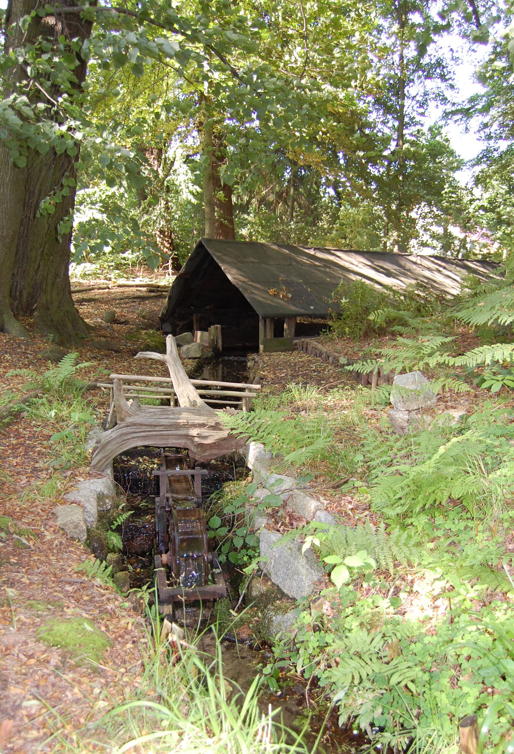 Pintschens Quell bei Byhlen, mit kleinem Wasserrad Dolnoserbski: Pintšowe žrědło